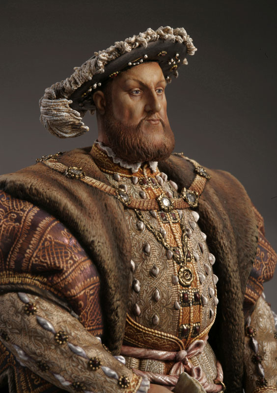 Фрагмент 120-милиметровой (12-сантиметровой) оловянной миниатюры "Генрих VIII". Художественная студия "Русский витязь". Скульптор: Польский Михаил, Художник: Сычева Галина.